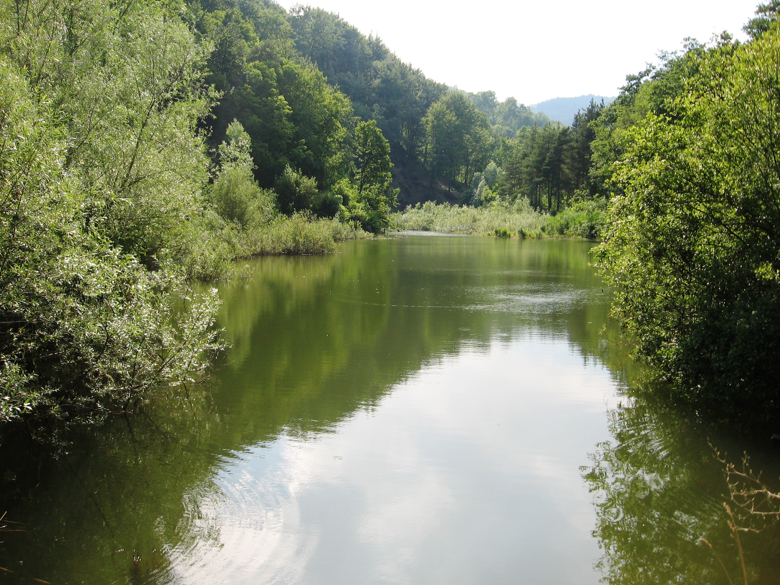 Gottasecca. Il lago del Vaglio. Pomeriggio del 12 Luglio.